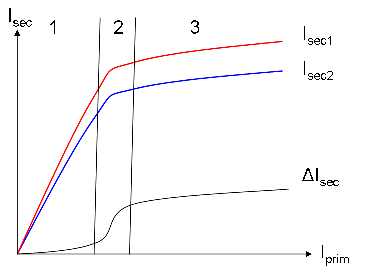 Illustration saturation des transformateurs de courant en cas de défaut et création d'un courant différentiel entre les transformateurs de courant